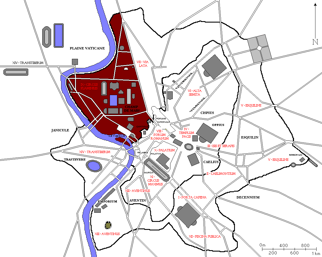 Plan de Rome avec la neuvième région des 14 régions d'Auguste